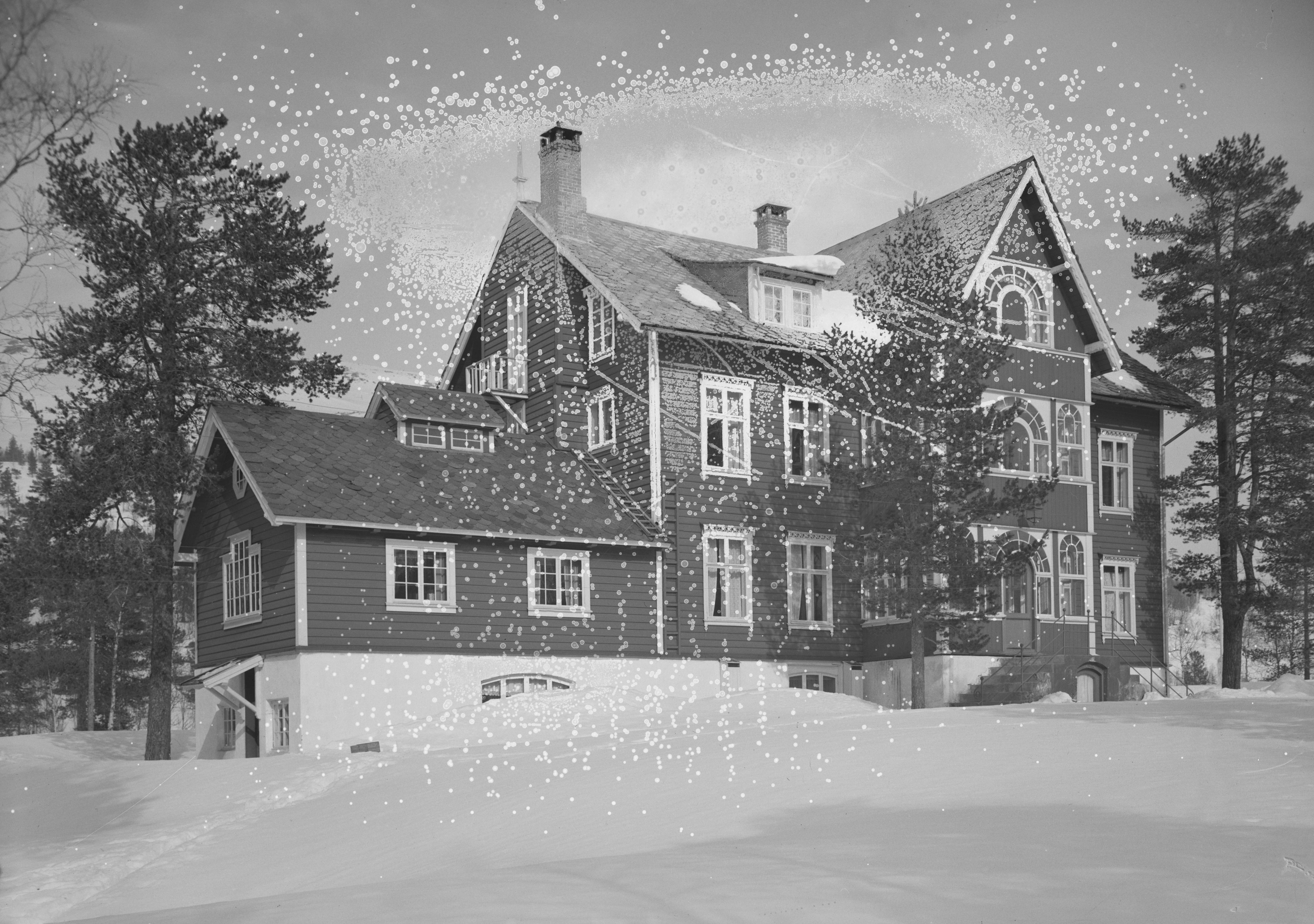 Bildet er hentet fra Nasjonalbibliotekets bildesamling. Anmerkninger til bildet var: Fotograf: Ukjent Mjølfjell, Voss, Hordaland